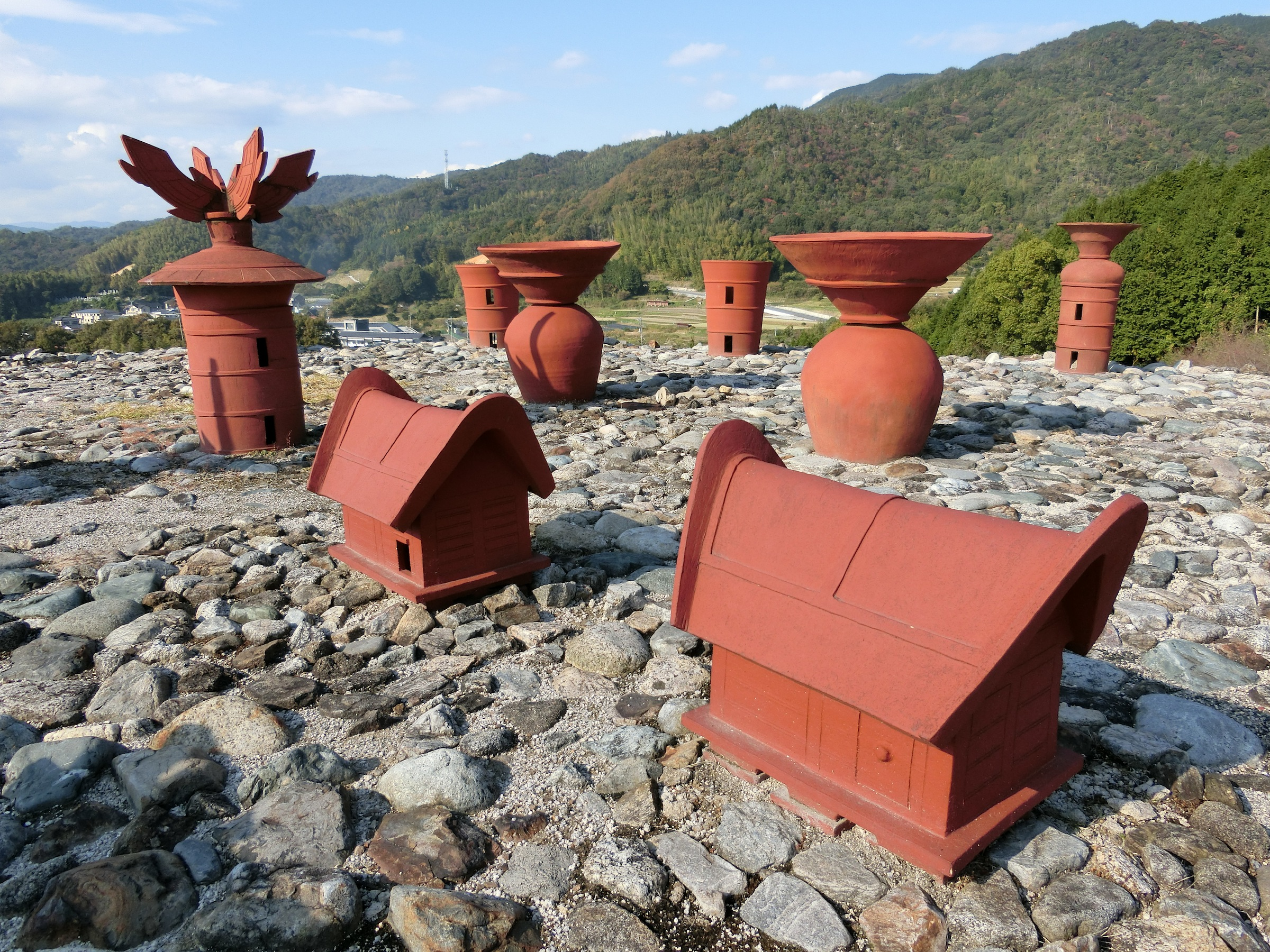 柳井茶臼山古墳に並べられた埴輪（柳井市）。